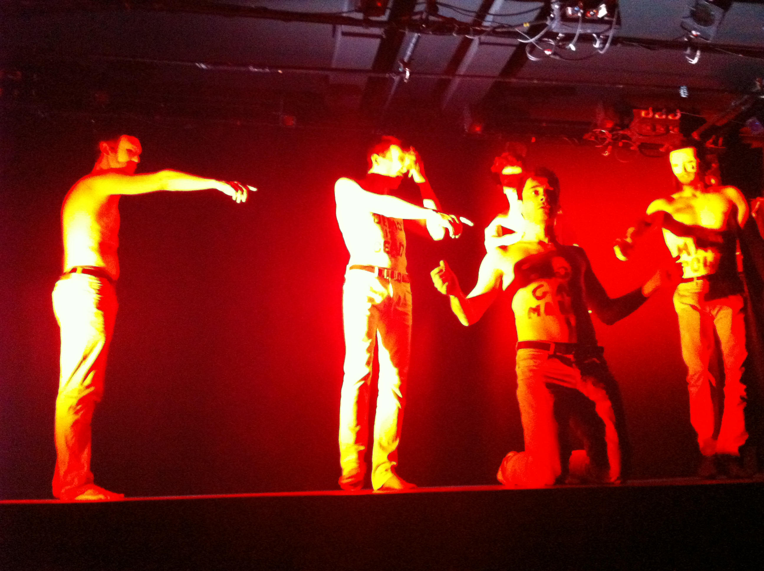 scena finale